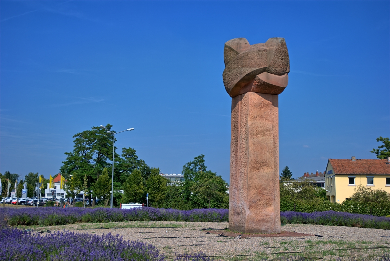 Skulptur Knotenpunkt (2002 ) von Karl-Heinz Deutsch. Sandstein. Standort: Kreiselkunstwerk Konrad-Adenauer-Str. / Josef-Probst-Str. / Sondernheimer Str., Germersheim